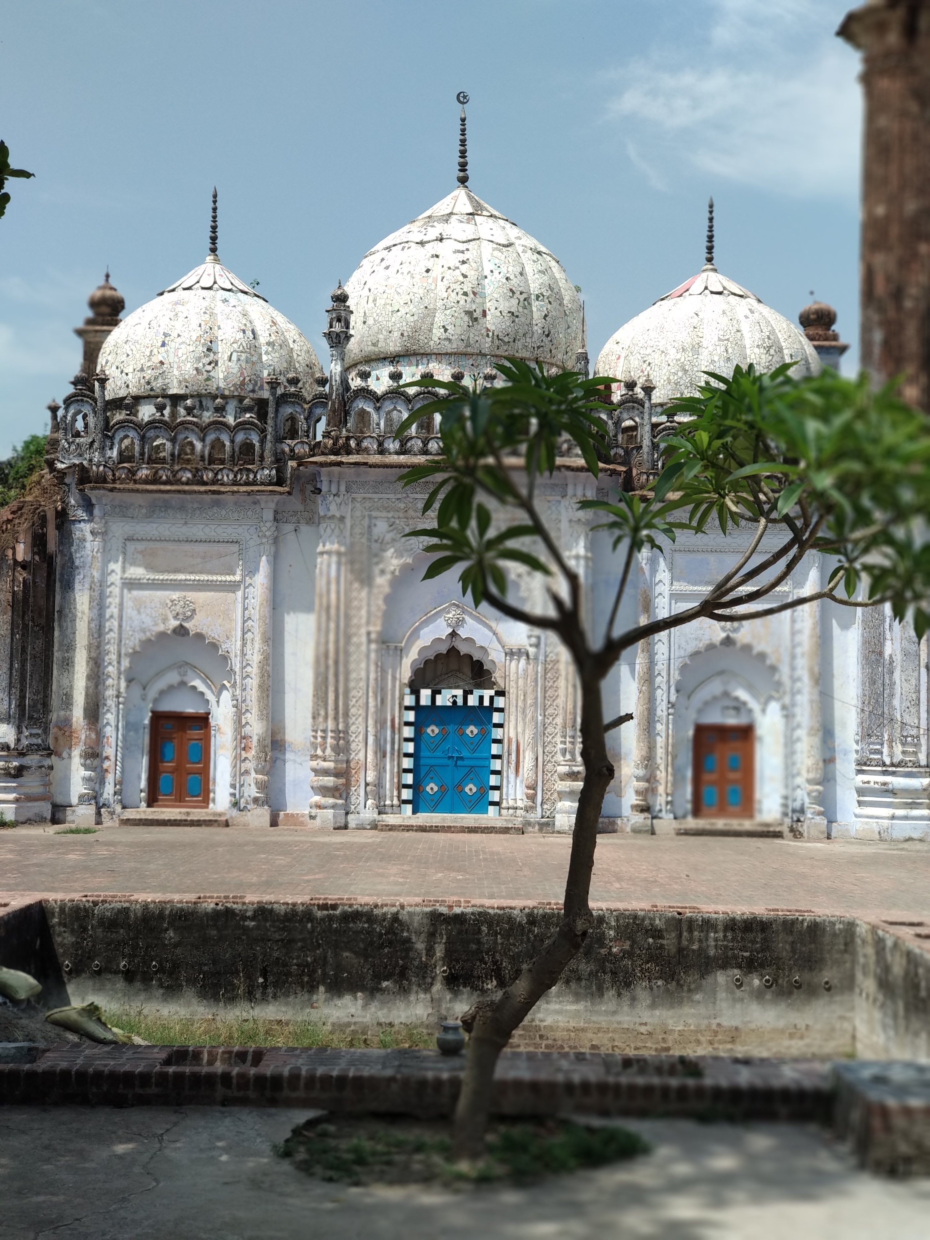 Shahi Jama Masjid of Madanjot Tepraha estate in Bahraich bulid by Thaku Salar Bakhsh Asghar Ali and Thakur Muzaffar Ali .